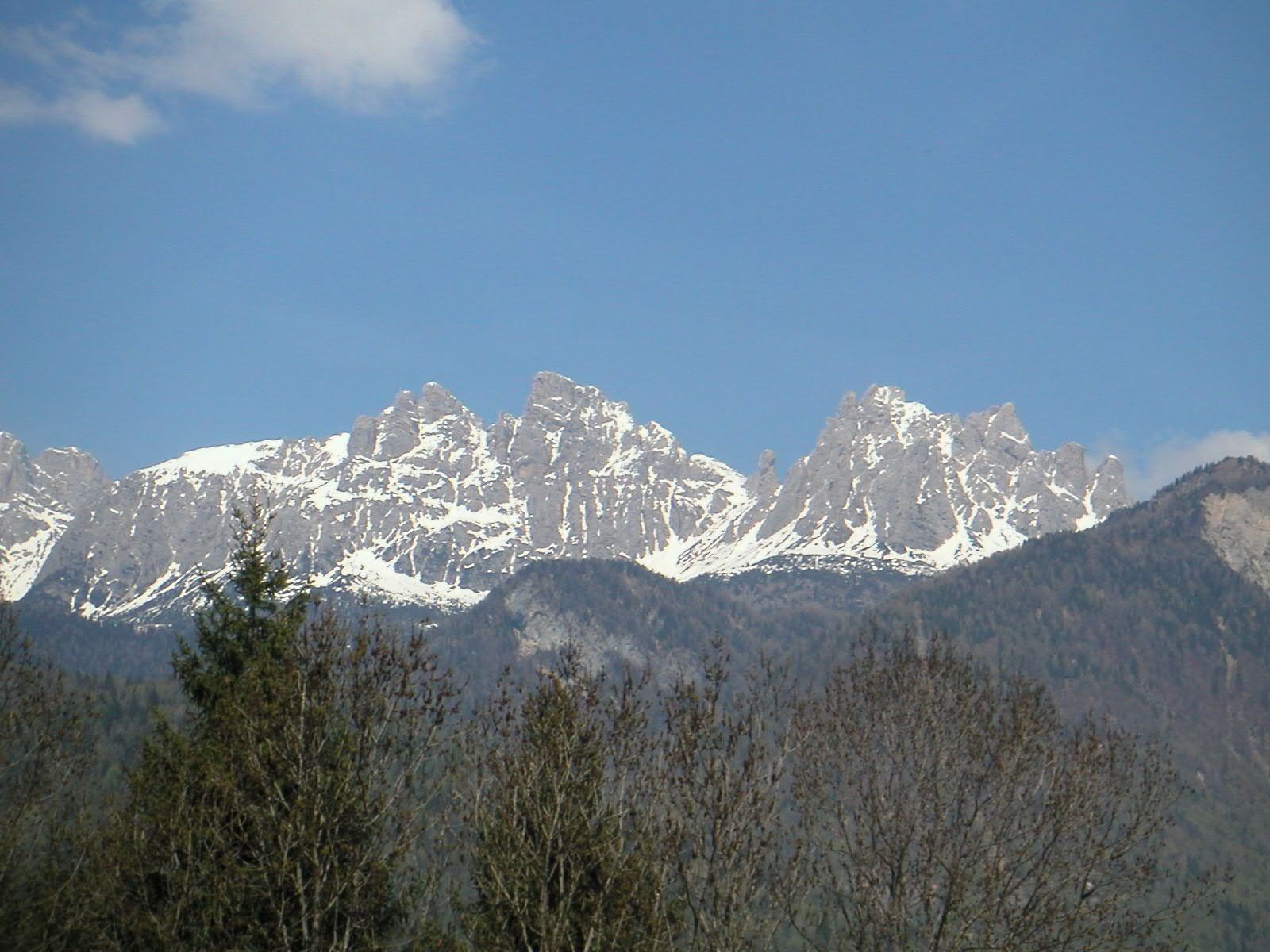 Il gruppo delle Marmarole viste da Lorenzago di Cadore